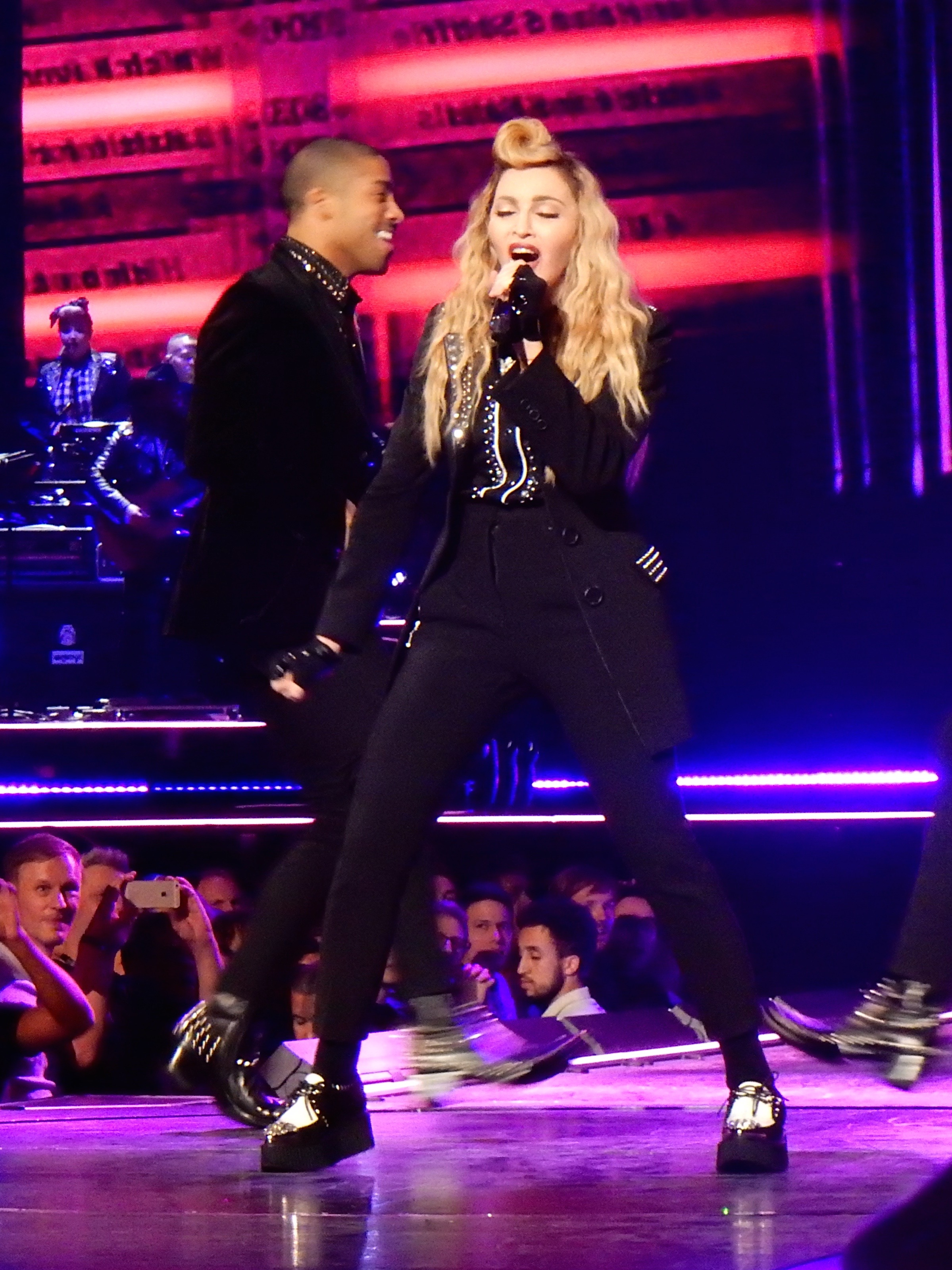 Madonna - Rebel Heart Tour Cologne 2